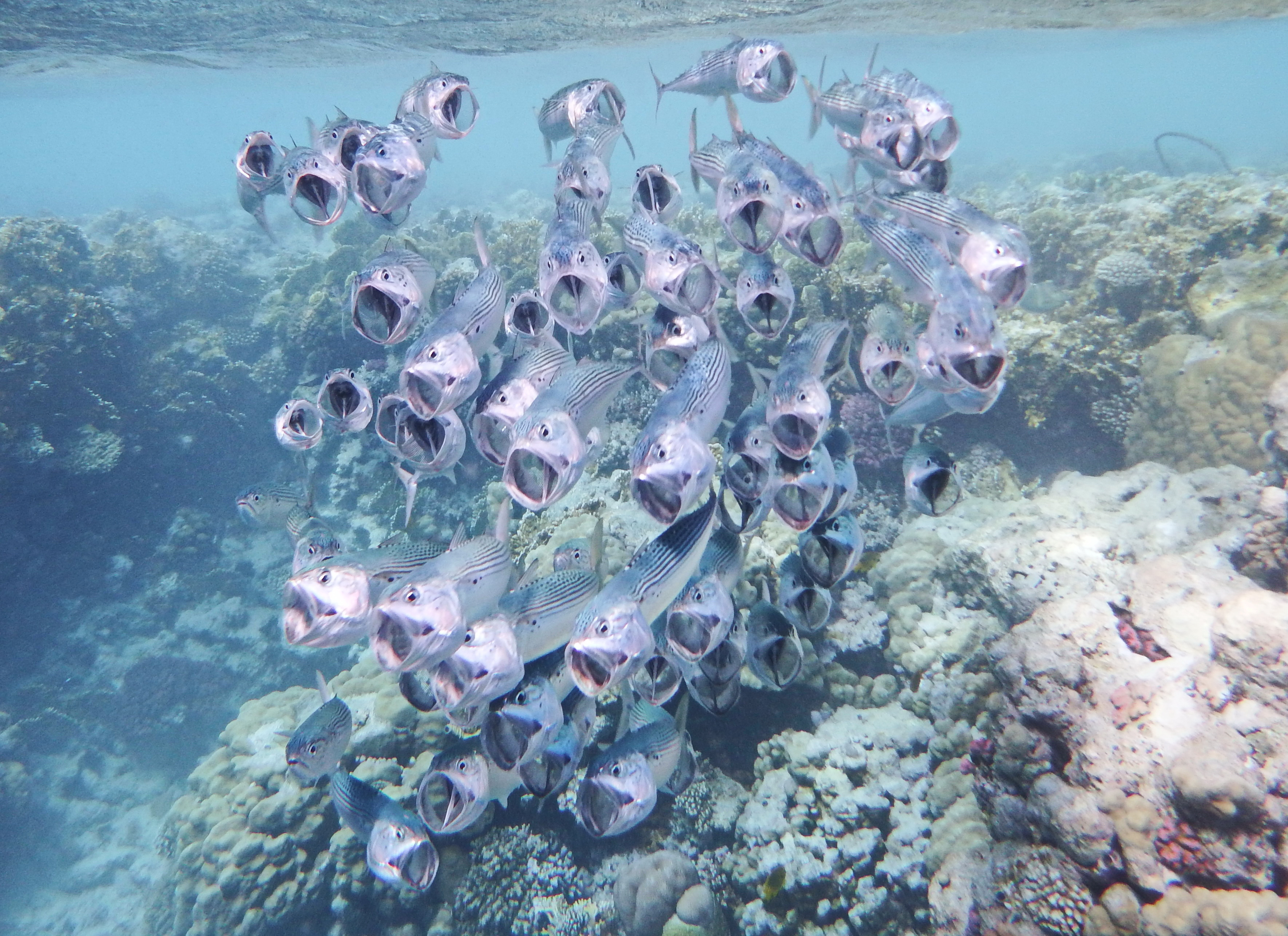 Rastrelliger kanagurta. Scombridae. Makrele im Roten Meer. VIDEO